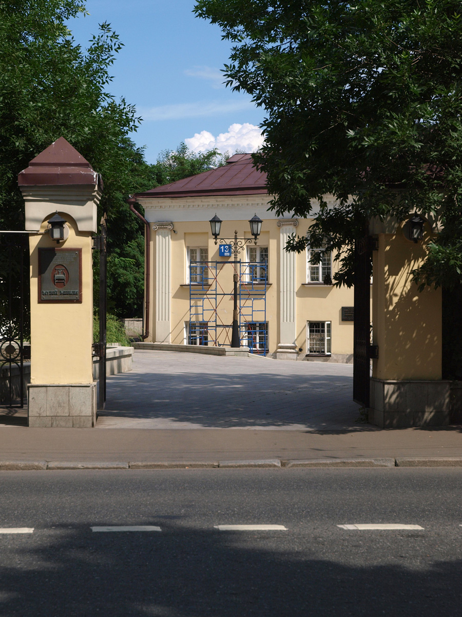 Taganskaya Street, Moscow